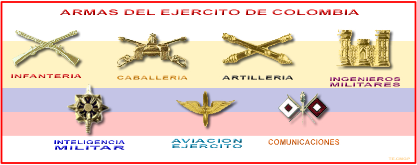 armas ejercito colombiano